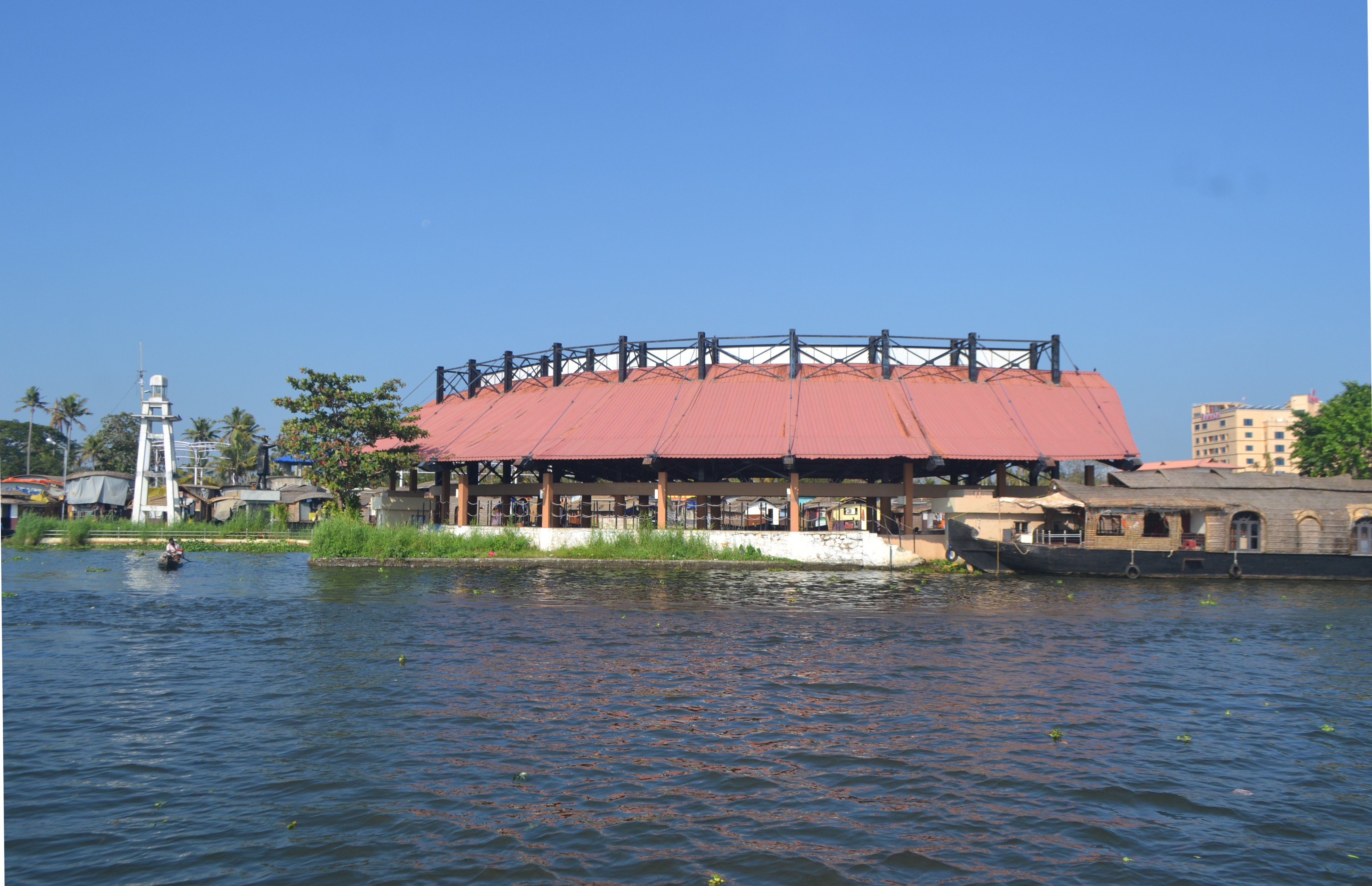 Wiki Sangamothsavam Jalayathra 2013